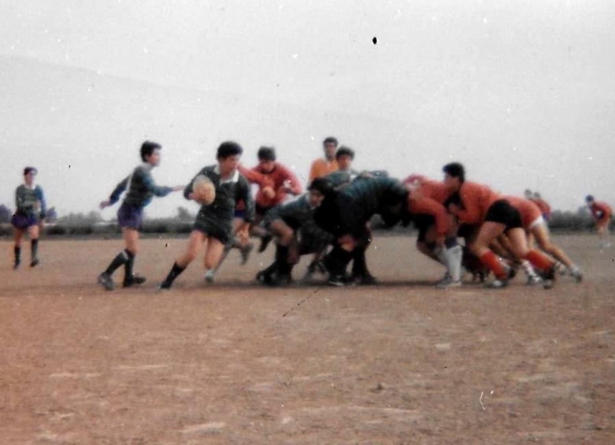 Equipo Cadetes en Can Casanovas